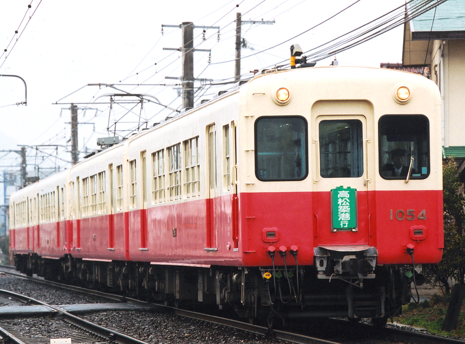 高松琴平電鉄 1054+1053+5052+1051